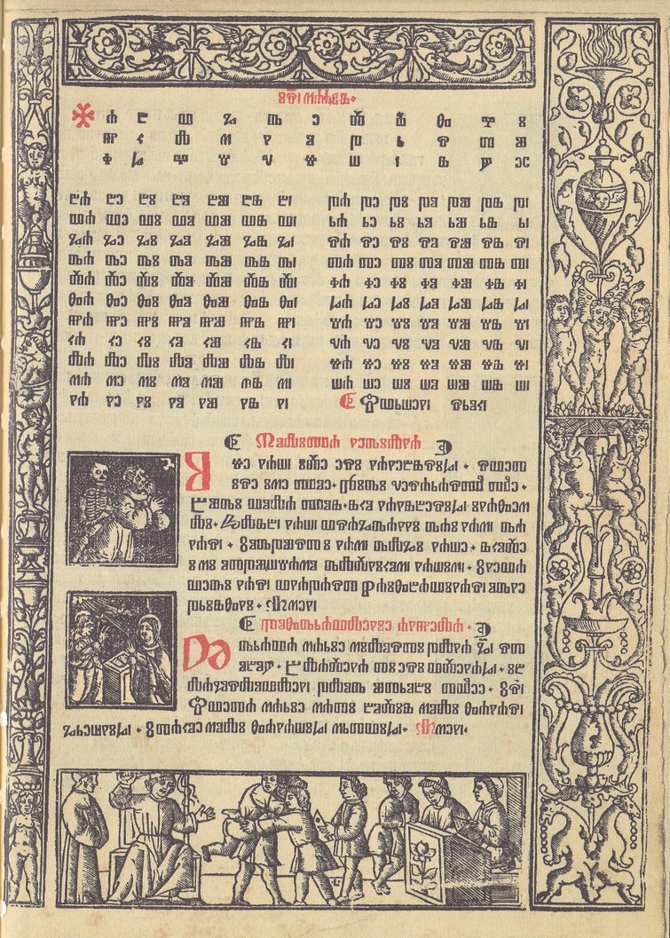 Molitva Očenaš na glagoljici objavljeno u prva potpuno sačuvana hrvatska početnica, koja je objavljena u Veneciji 1527, u grafičku Andrea Toressano